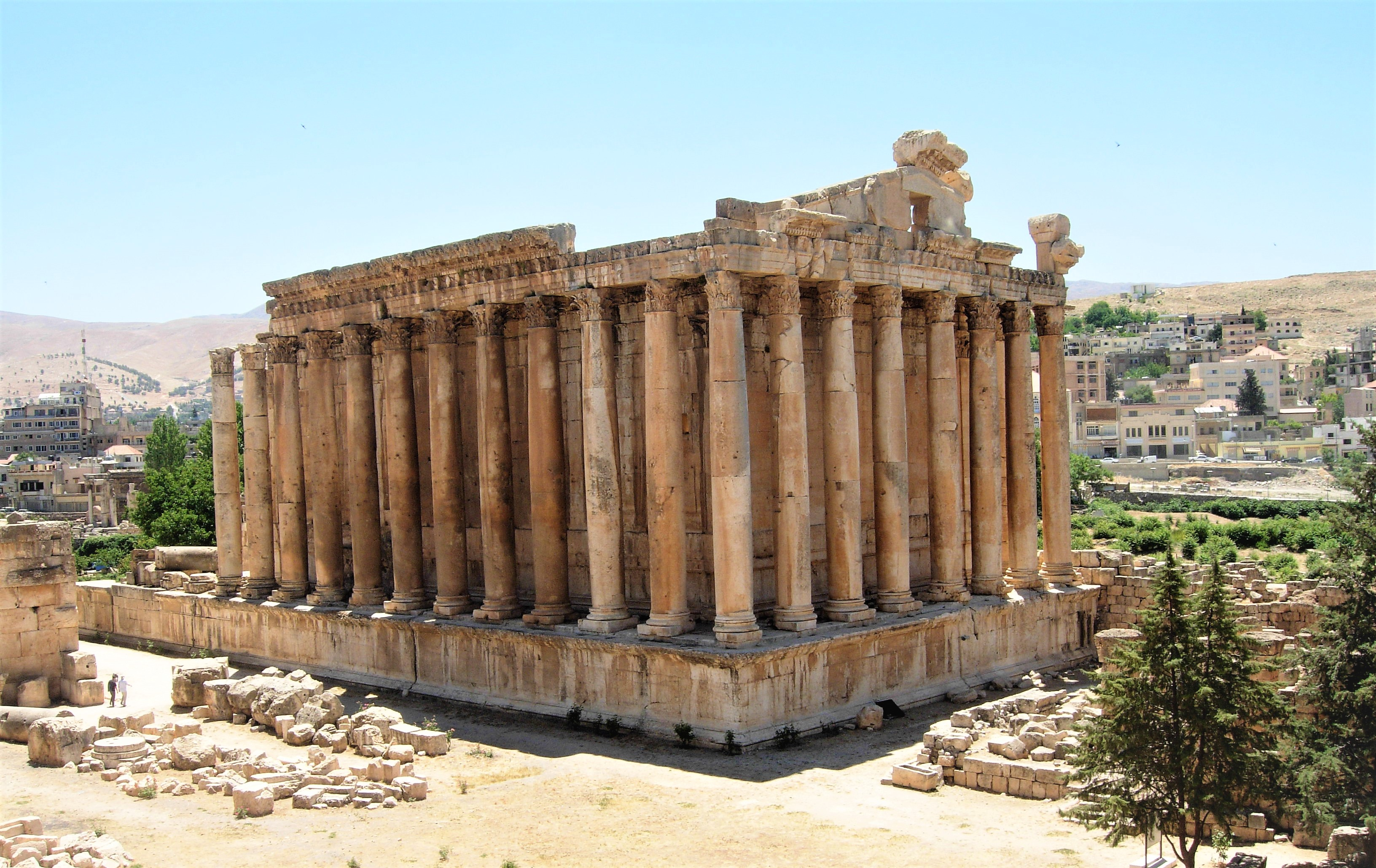 中文（台灣）: 巴貝克神殿外觀